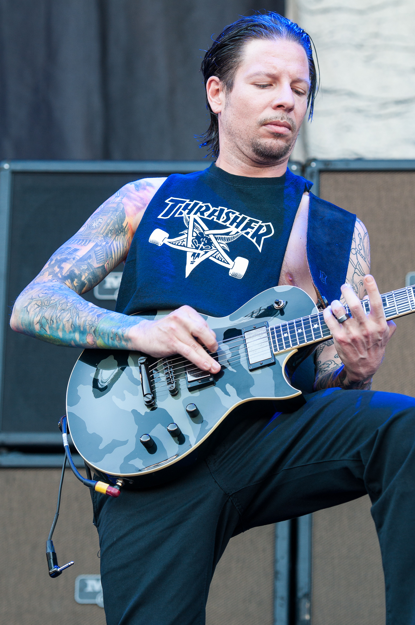 ARGO-Konzerte,Beck's Park Stage,Festival,Konzert,Lamb of God,Livekonzert,Livemusik,Musik,RiP,Rock im Park 2015,Willie Adler